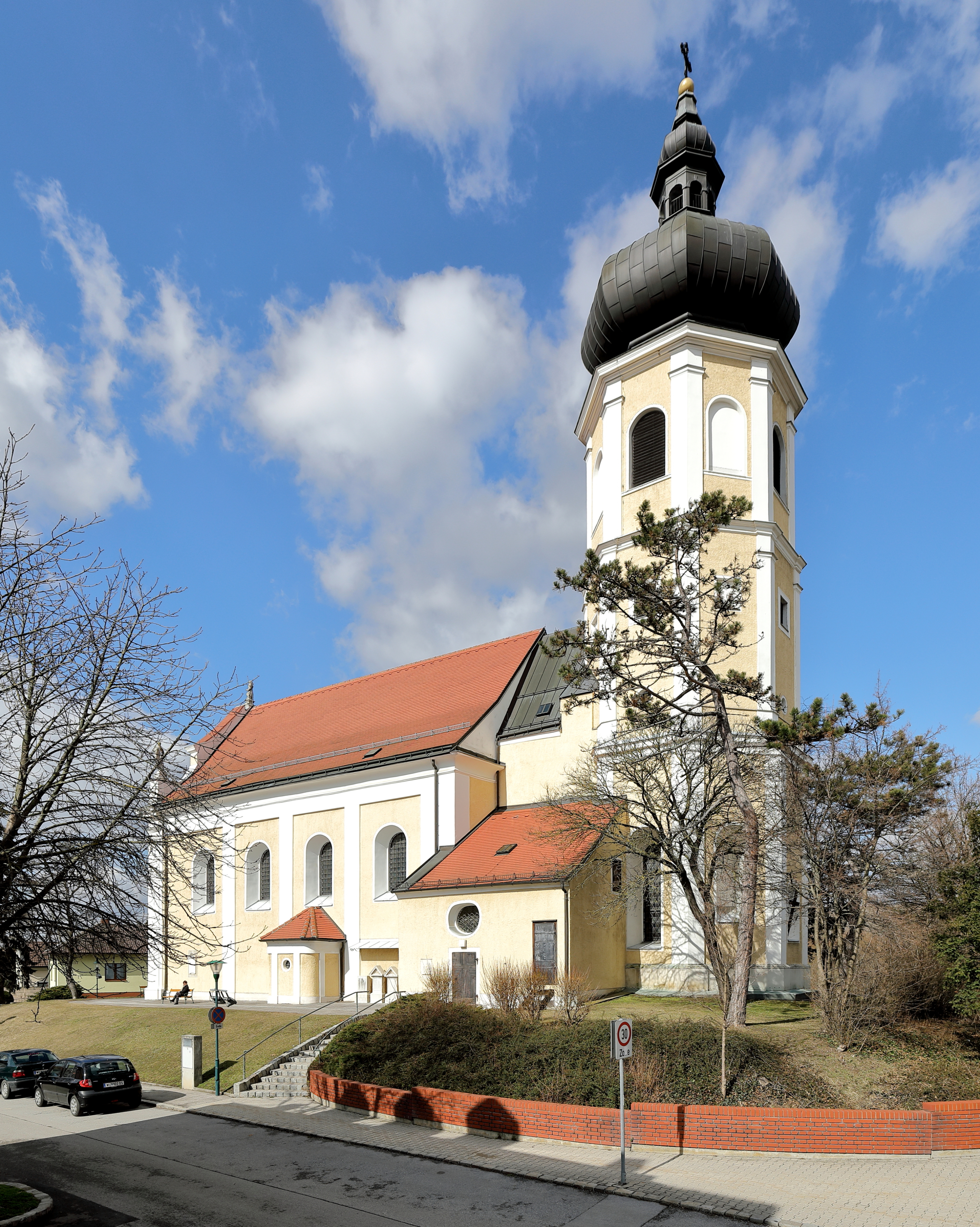 Südostansicht der röm.-kath. Pfarrkirche hl. Michael in der niederösterreichischen Stadtgemeinde Fischamend.Das hohe, blockhafte Langhaus mit Lisenengliederung und Rundbogenfenstern wurde um 1700 errichtet. Der gotische Chor mit 5/8-Schluss stammt vermutlich aus der 1. Hälfte des 14. Jahrhunderts. Darauf wurde Ende des 17. Jahrhunderts ein oktogonaler Turm mit massiger Zwiebelhaube errichtet. Nordseitig des Chores ist eine Kapelle angebaut und südseitig die Sakristei.